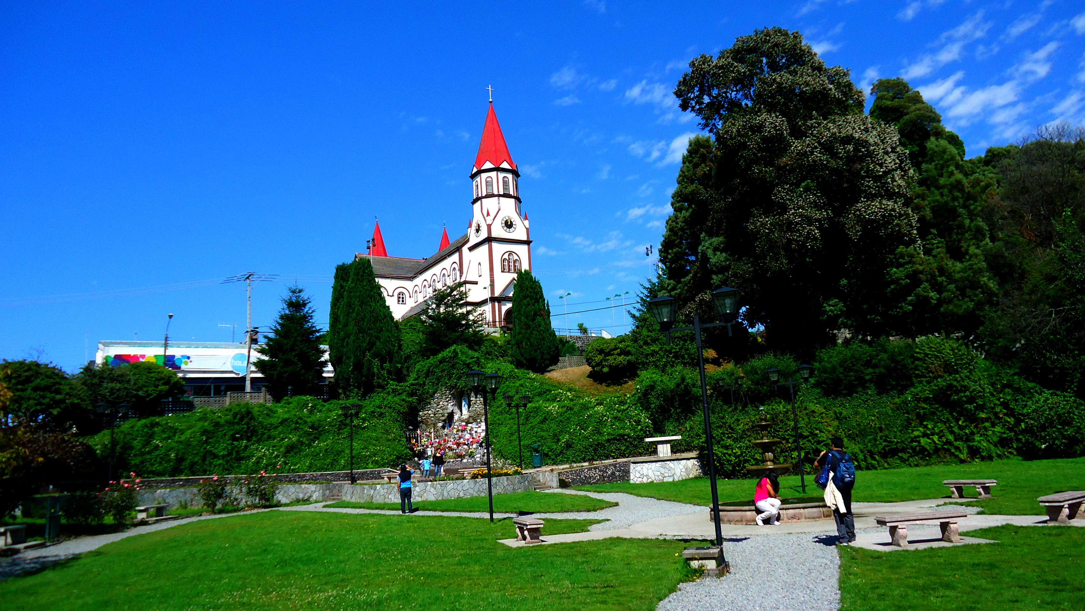 Iglesia Parroquial de Sagrado Corazón This is a photo of a national monument in Chile: 721